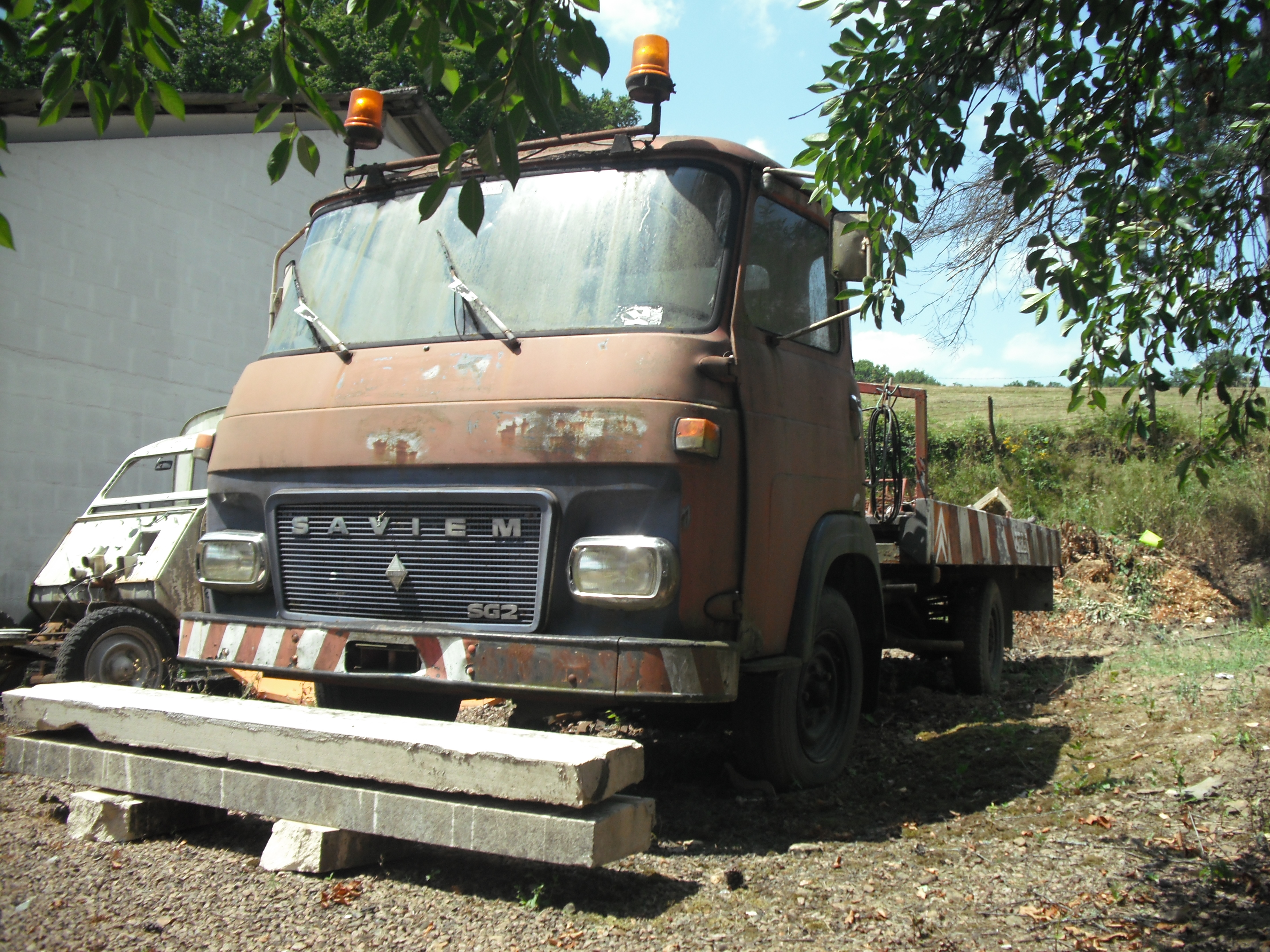 Saviem SG 2